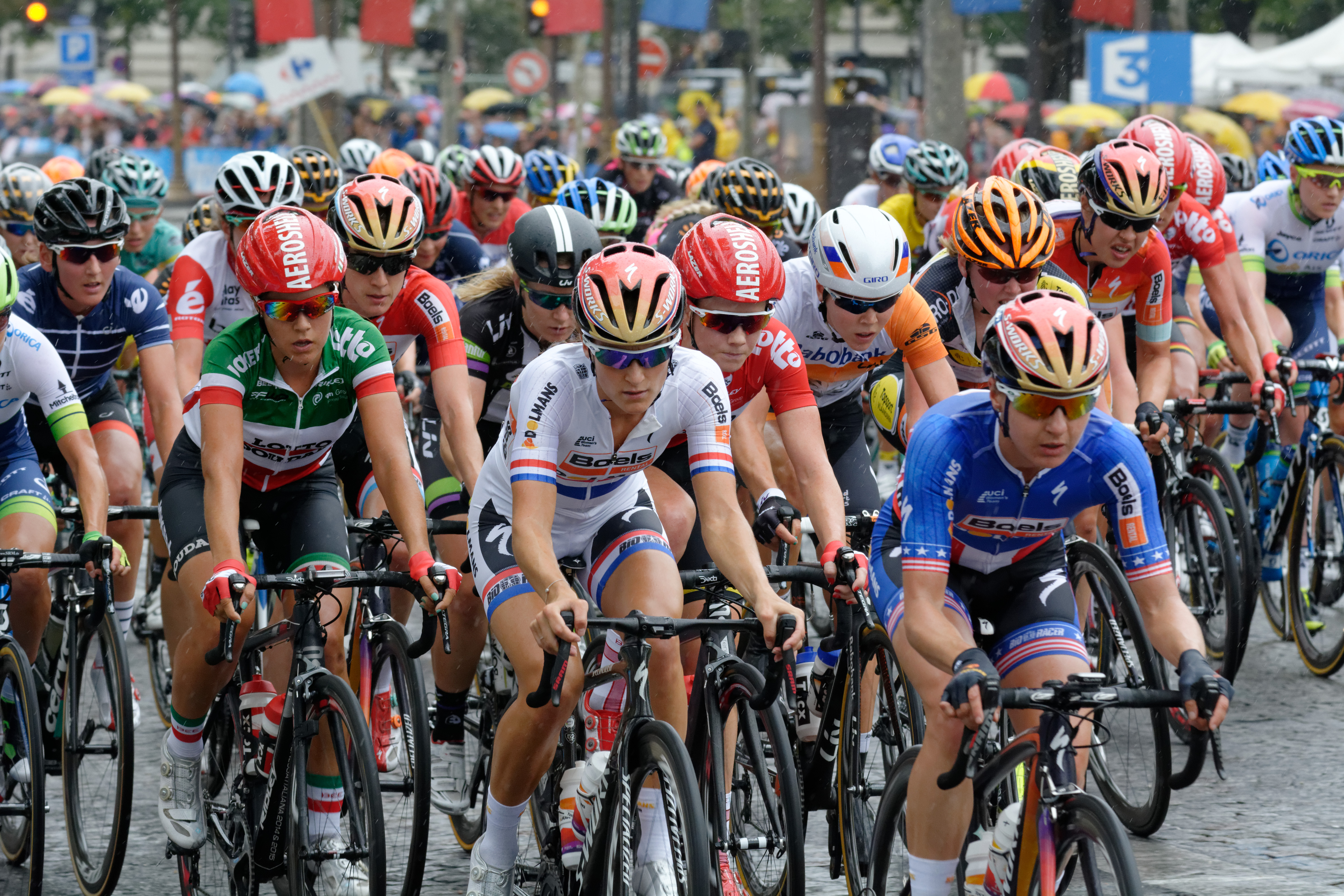 D71_1703_DxO